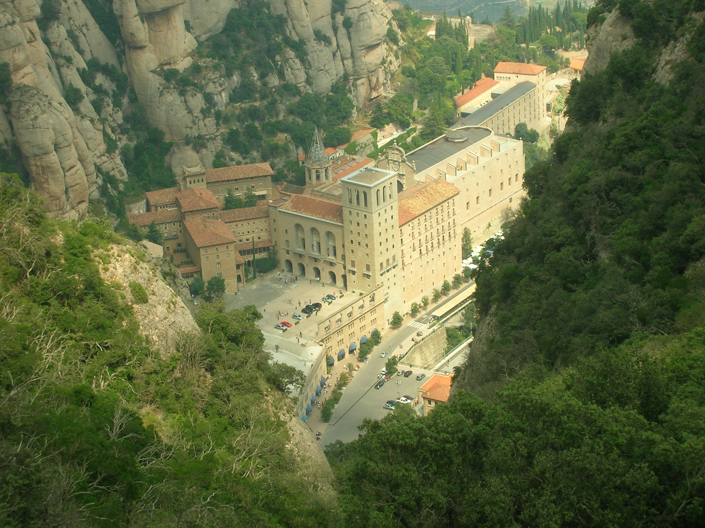 Montserrat. View from the rock above. Zoomed Вид на монастырь Монтсеррат с горы. Приближенно.